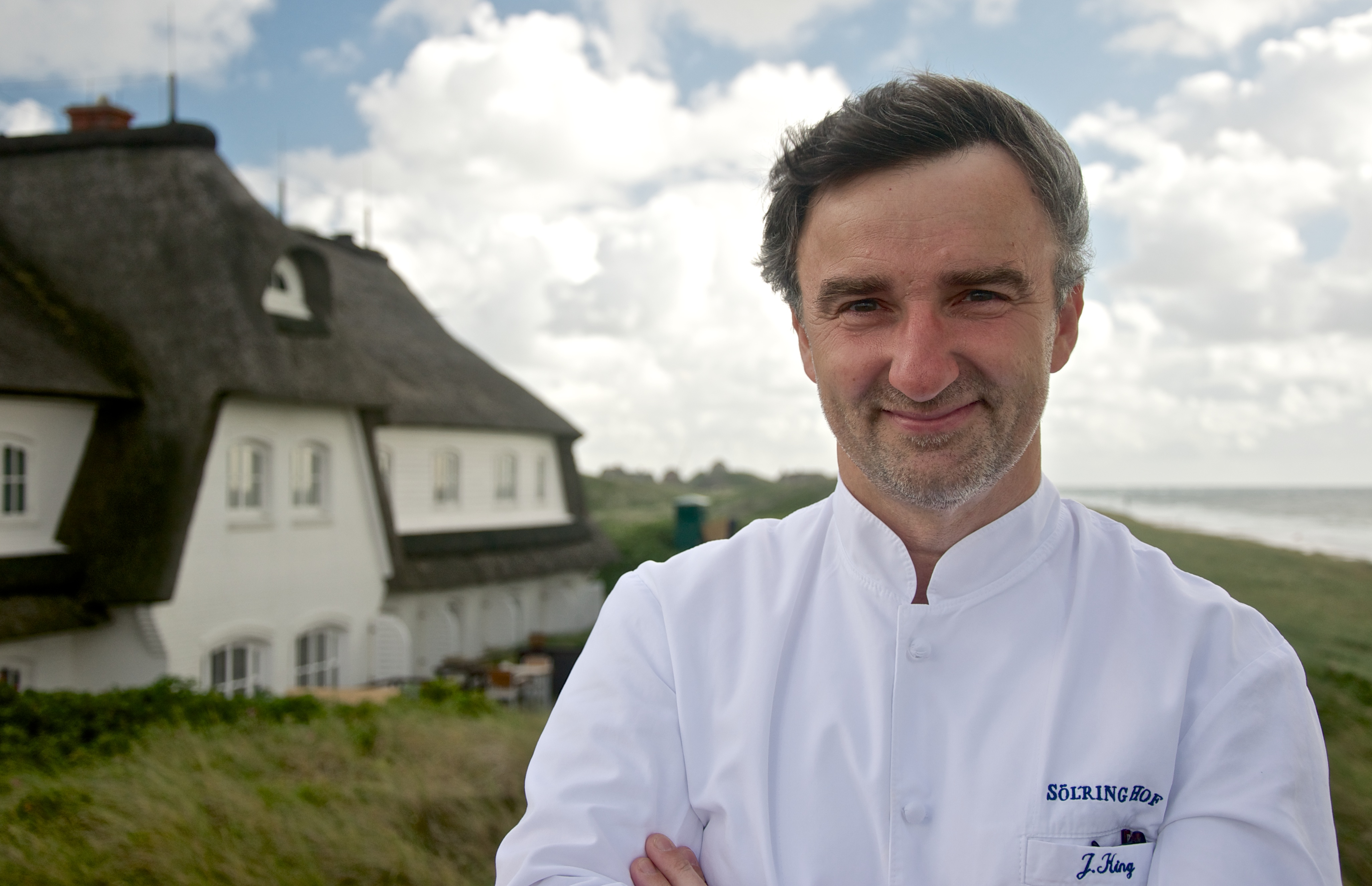 Johannes King vor dem Söl'ring Hof in Rantum auf Sylt.